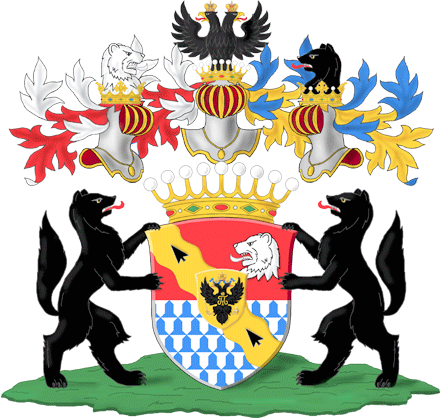 Герб рода барона Строгонова (Строганова), имеющего титул графа Римской Империи